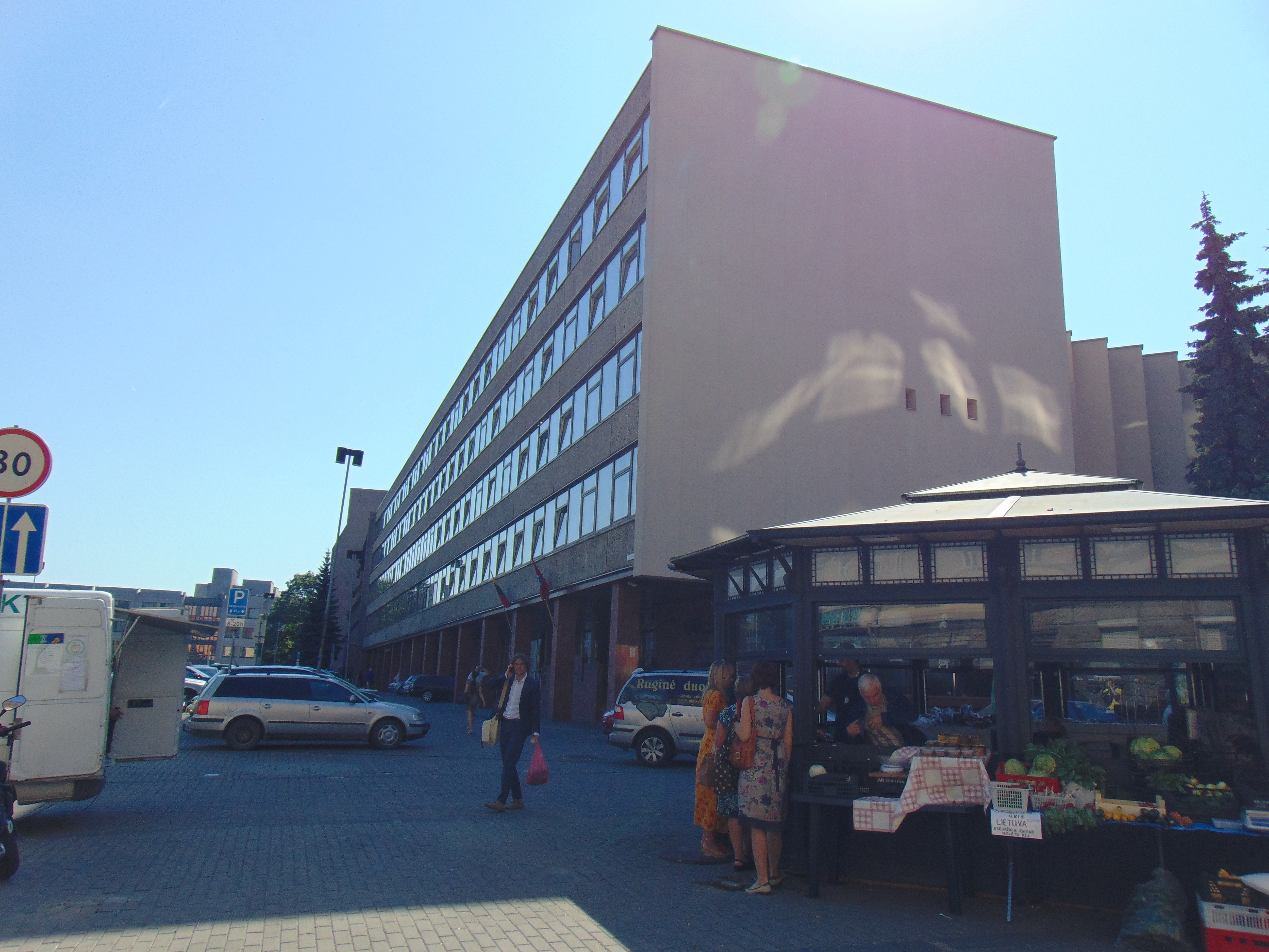 J. Lelevelio g. 6